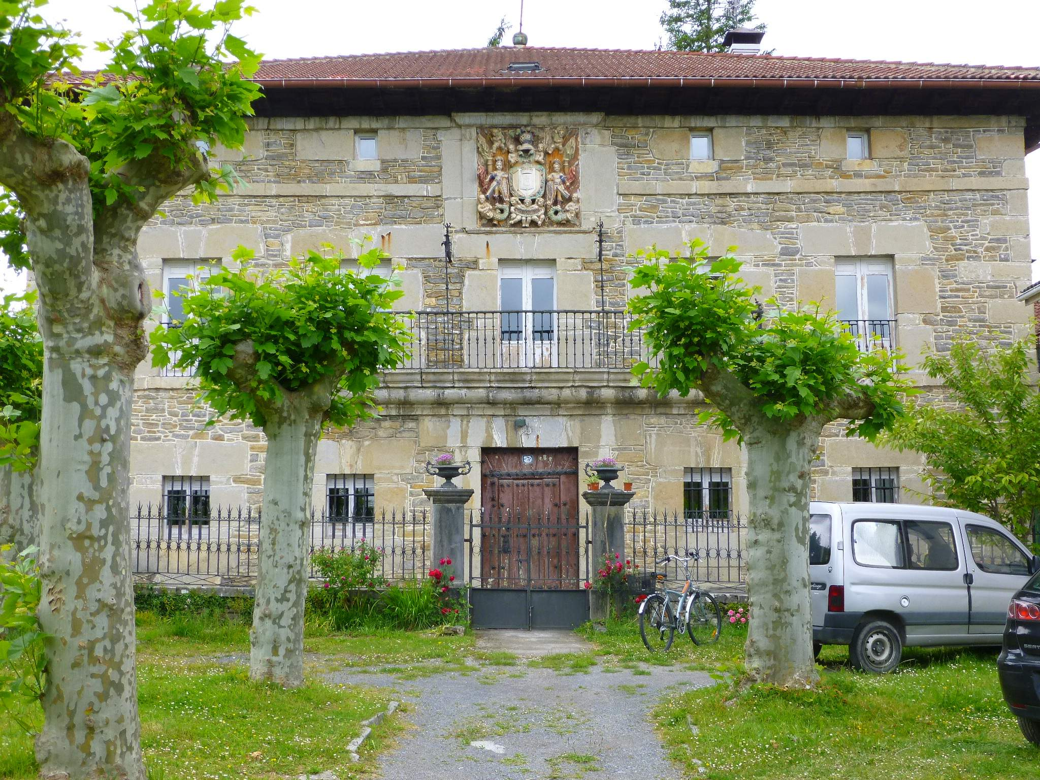 Palacio de Cerrajería, Arespalditza